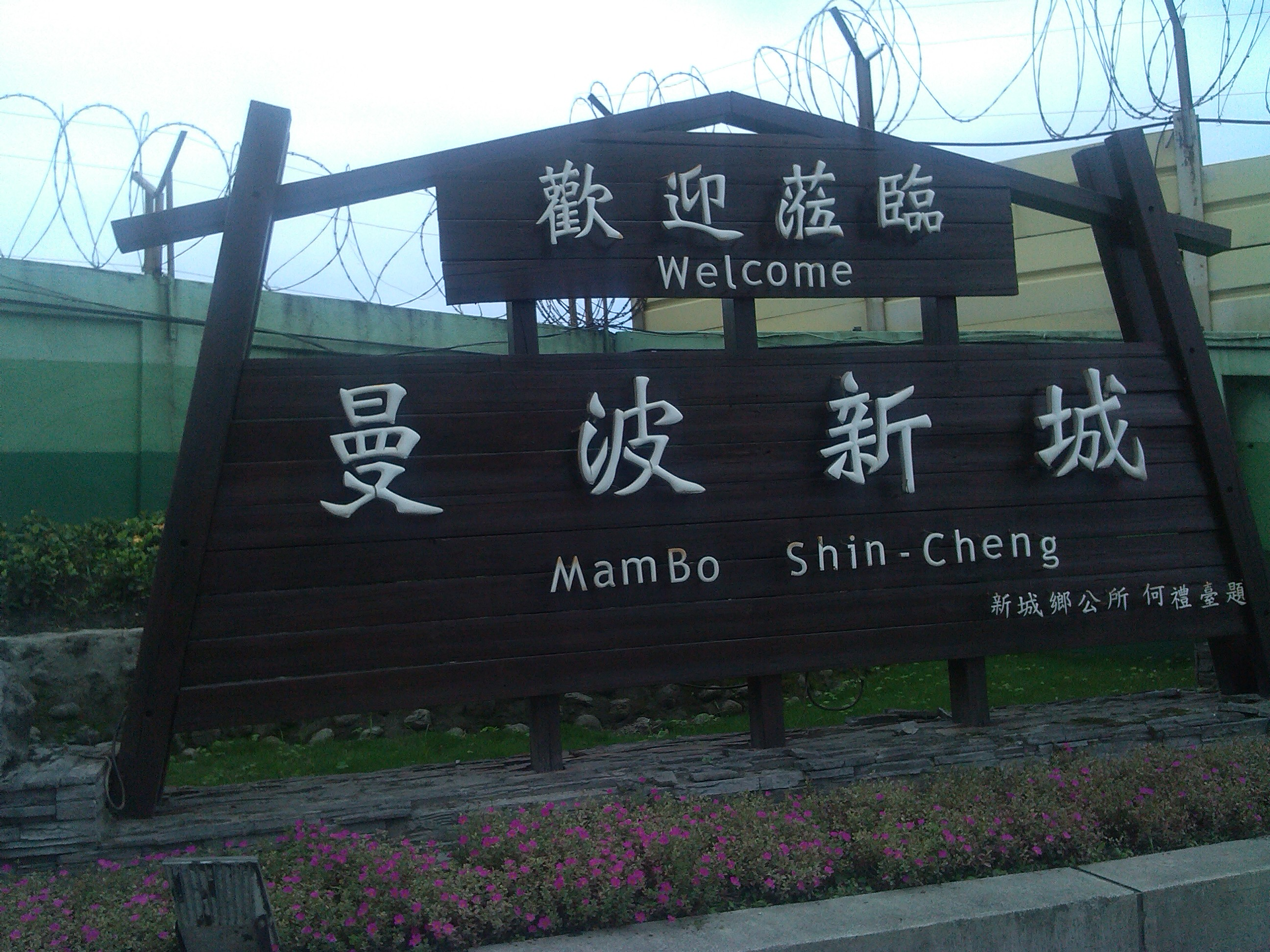 台9線省道約200k處 新城鄉長何禮臺所設的迎賓告示牌